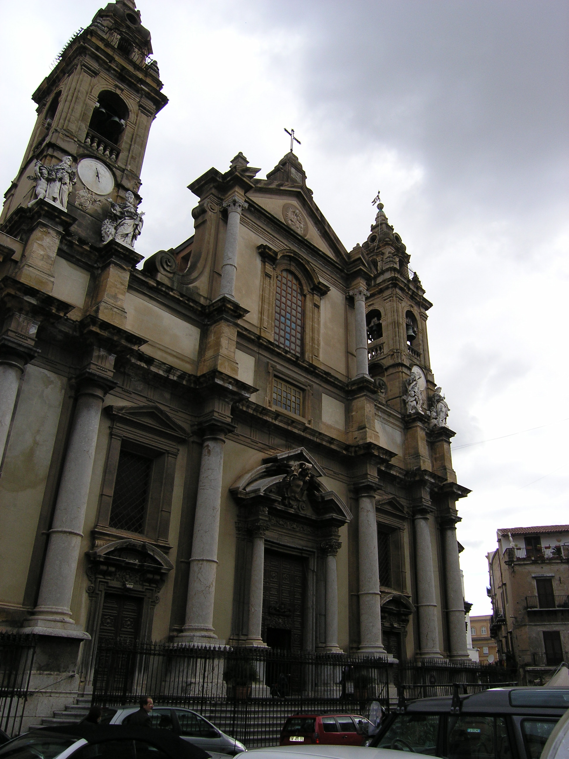 Sicilianu: Crèsia di Santu Gnazziu - Olivella